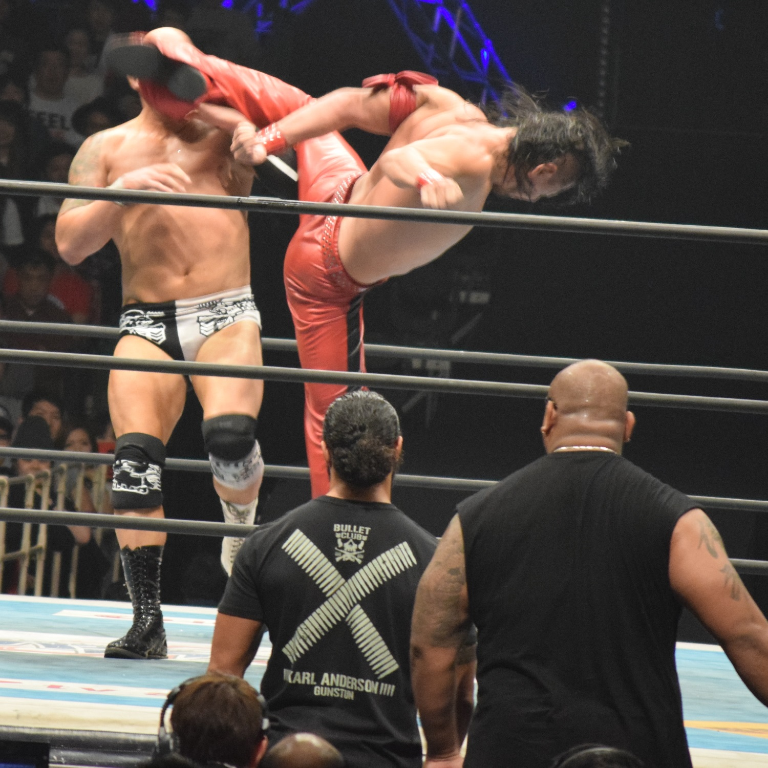 2015年11月7日 大阪府立体育会館 「POWER STRUGGLE」 カール・アンダーソンにボマイェを放つ中邑真輔